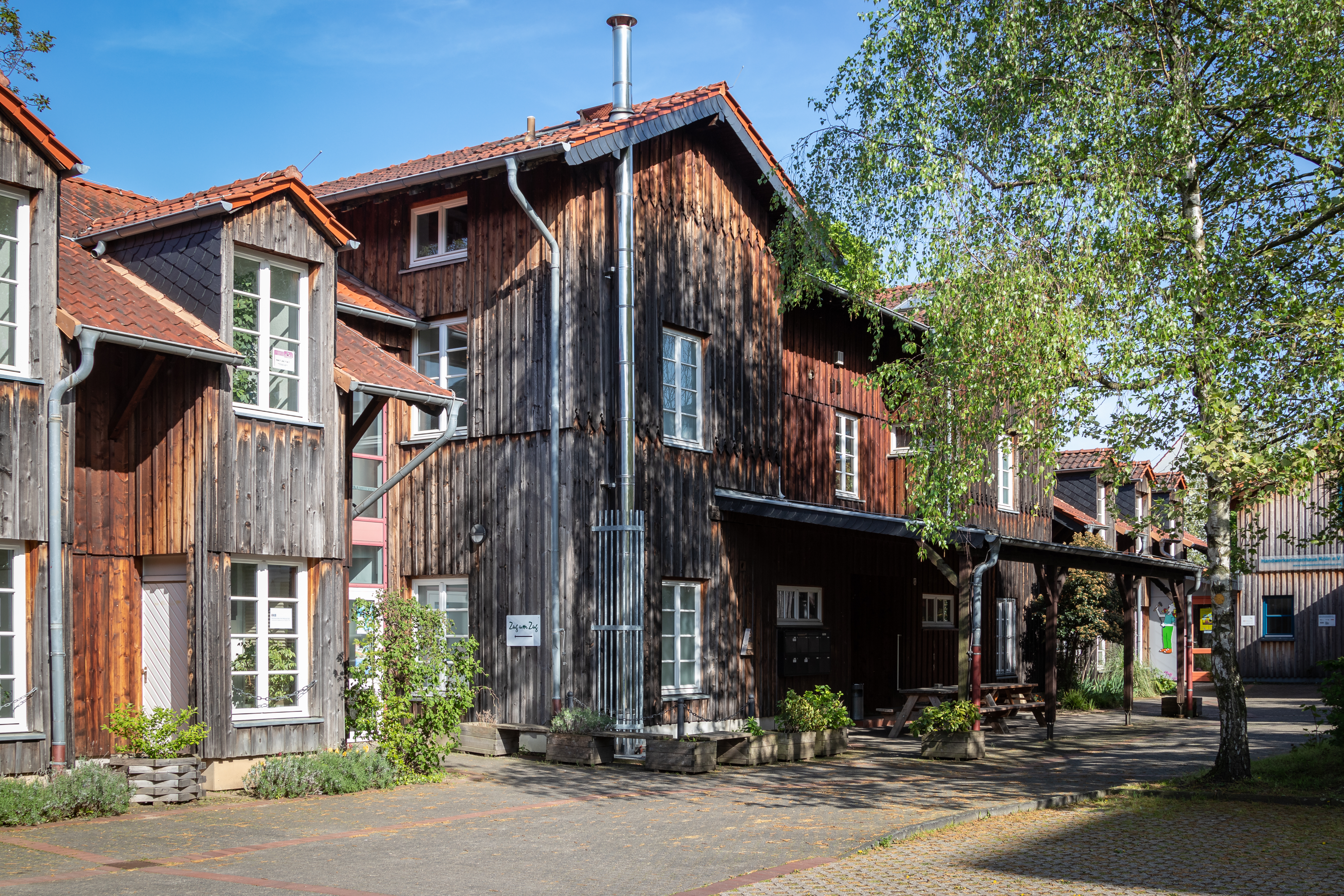 Alter Worringer Bahnhof, jetzt: Handwerkerinenhaus, Zug um Zug und weitere Initiativen in Köln-Nippes